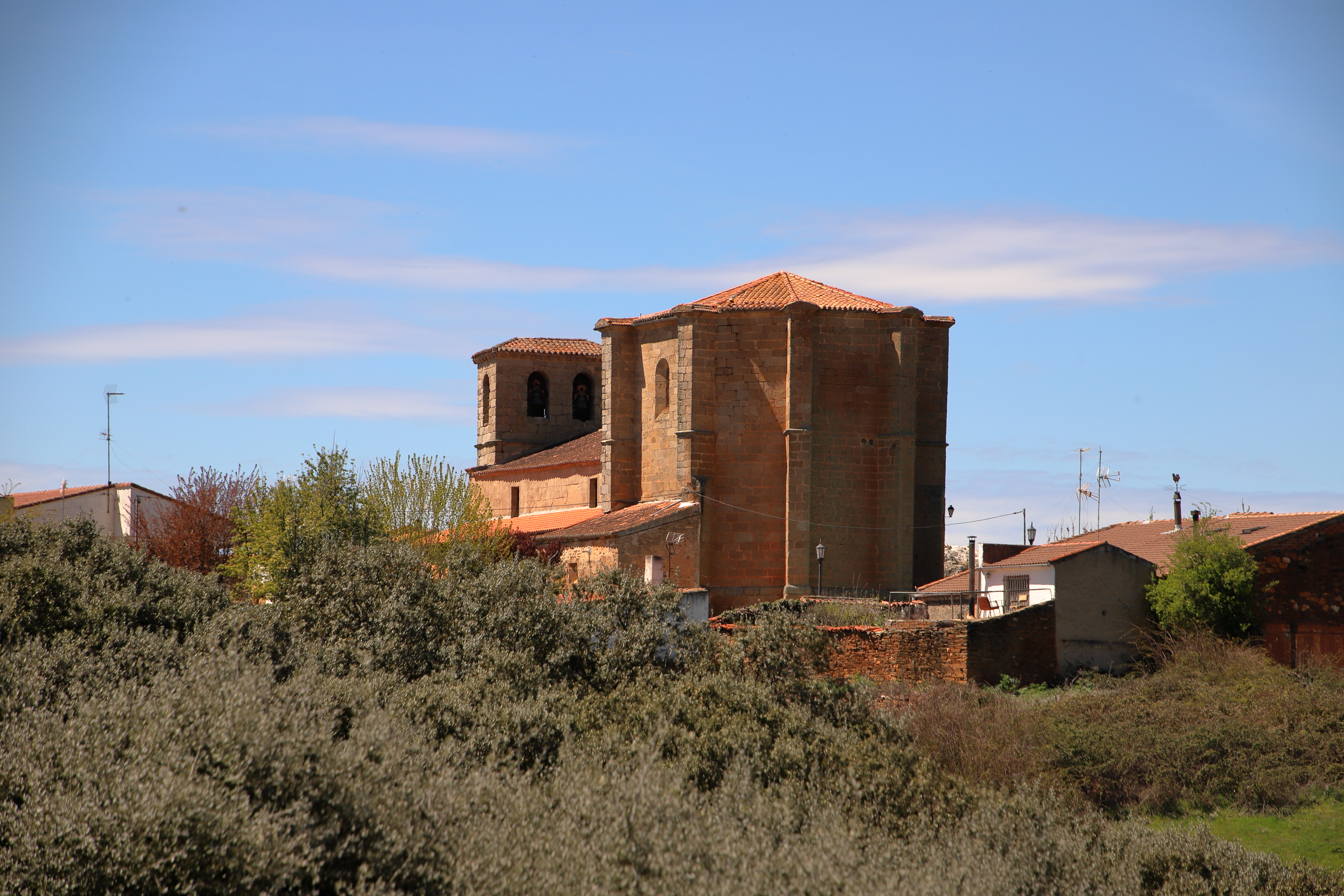 Guijo de Ávila es un municipio de la comarca Alto Tormes, provincia de Salamanca.